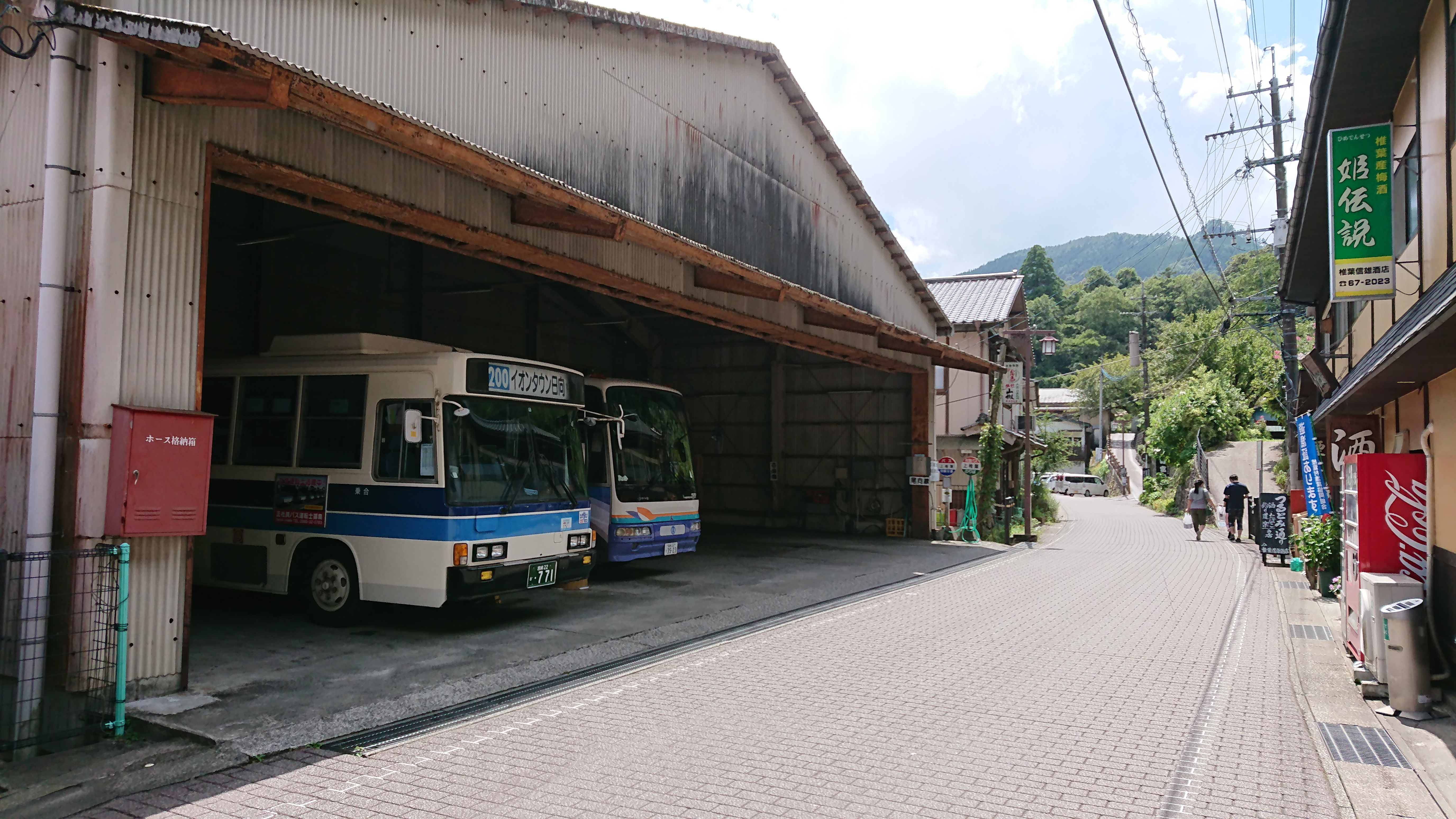 宮崎交通椎葉車庫、上椎葉バス停と併設する。中型バス５台以上を収容できる規模を誇り、往年の椎葉村の活気を物語る。現在は椎葉村ひえつき交通との共用となっている。